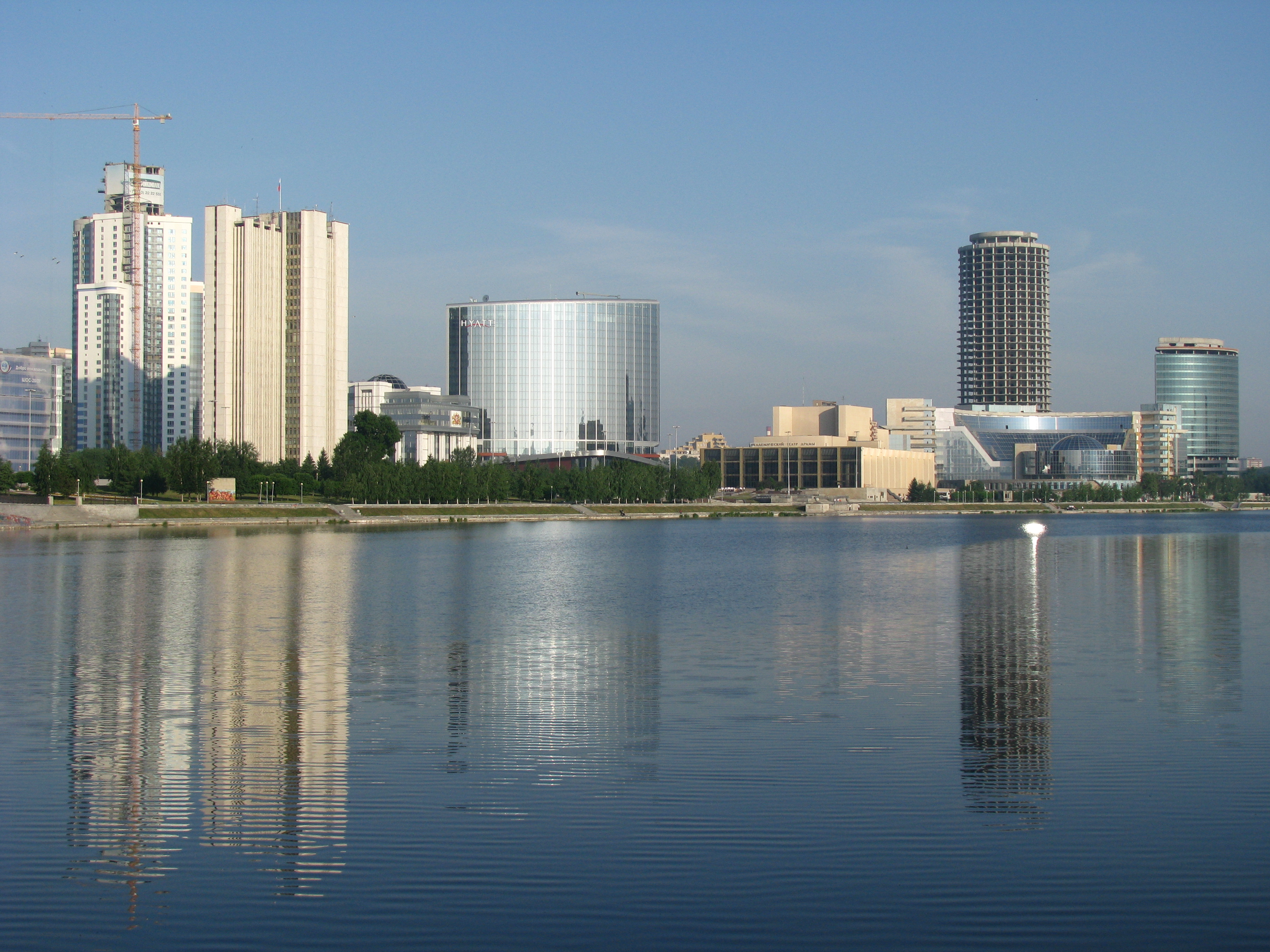 Набережная в Екатеринбурге